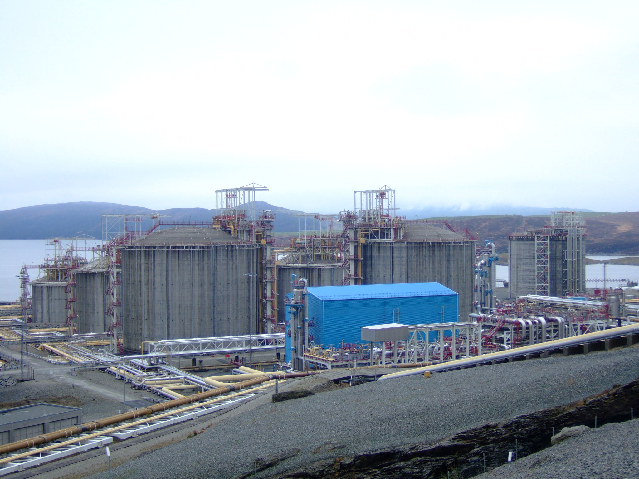 Kårstø gasskraftverk under bygging